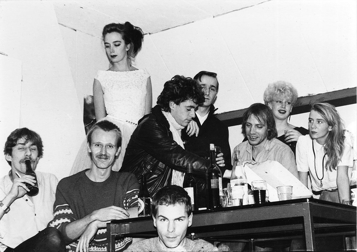 Groepsfoto De Koffieband jeugdsoos Brogum Zierikzee